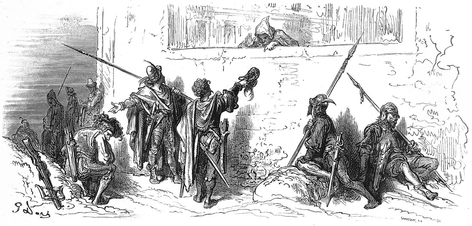 grafika z książki PL Bajki, Jean de La Fontaine, nakładem i drukiem Jana Noskowskiego, Warszawa 1876